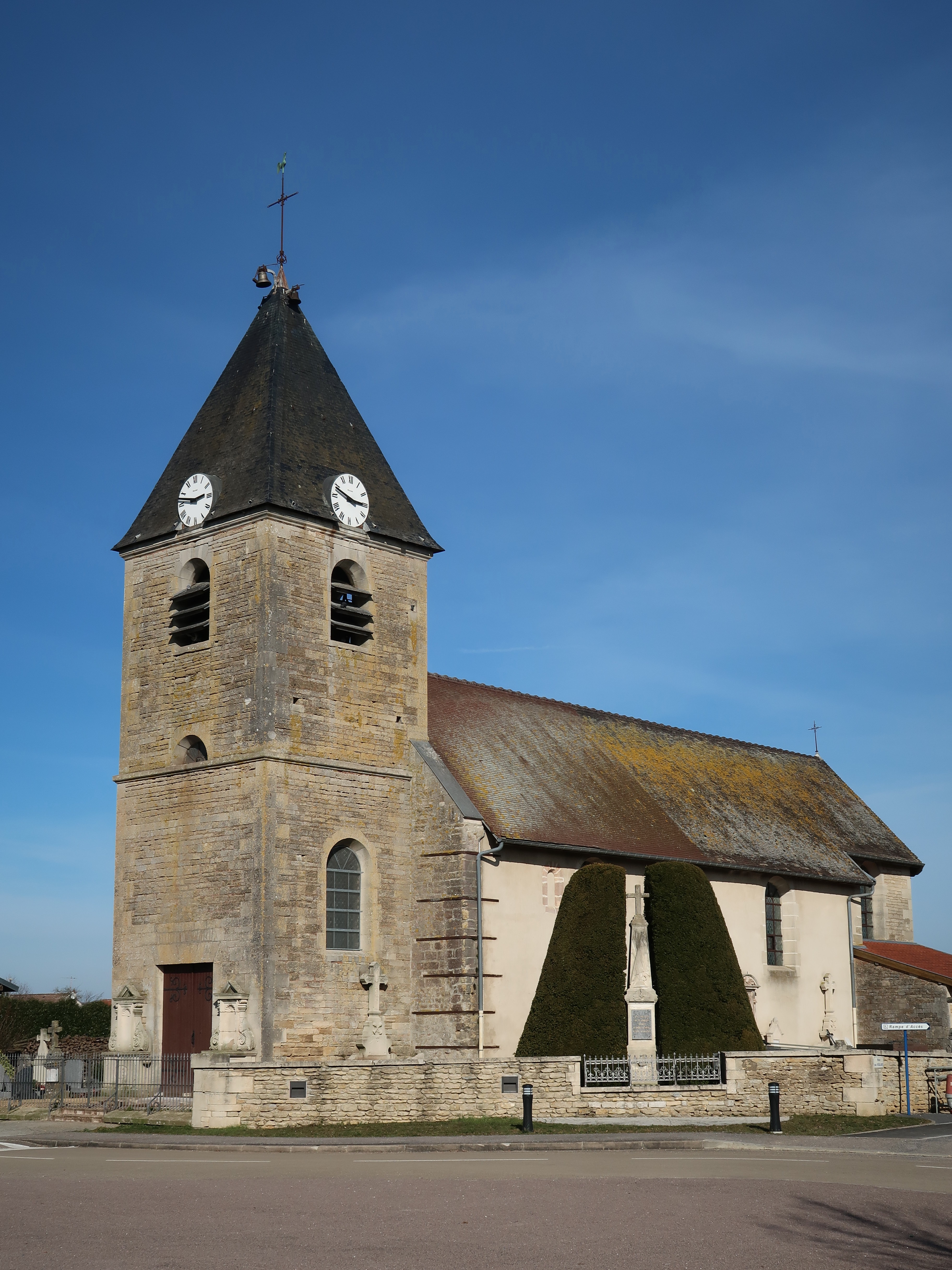 Planrupt, église .